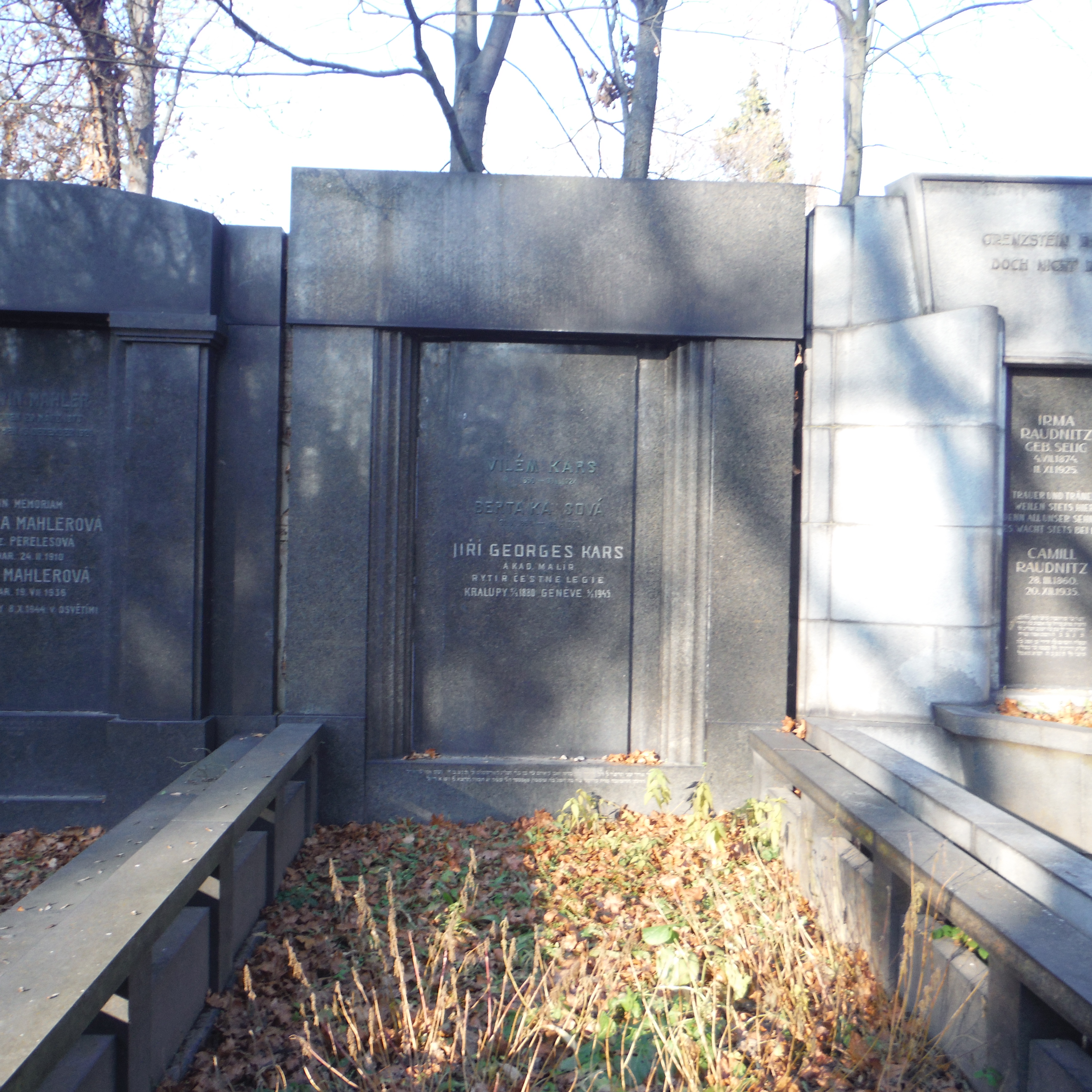 hrob